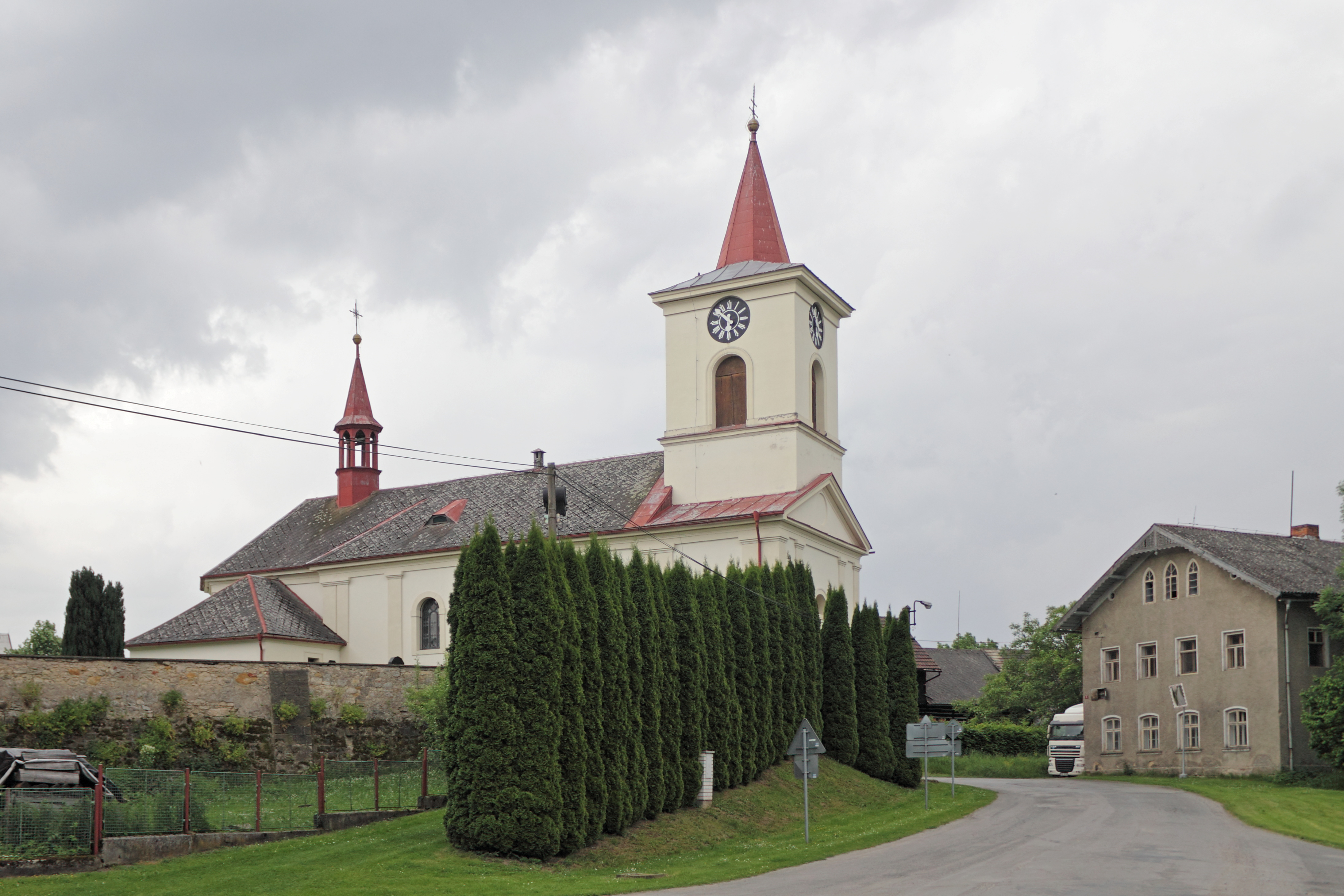 Kostel svatého Bartoloměje, Sezemice v okrese Mladá Boleslav